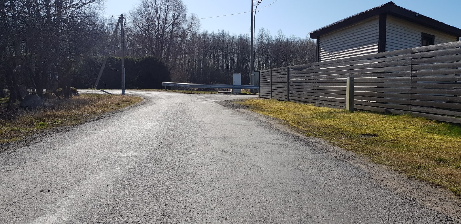 Vaade Maria teele (paremal) Ööbiku teelt